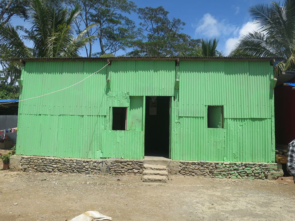 Hütte in Tocoluli